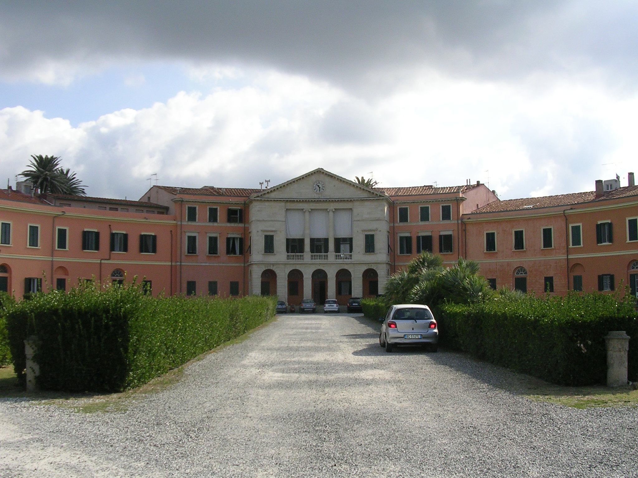 Livorno: Casini d'Ardenza progettati da Giuseppe Cappellini (XIX secolo).